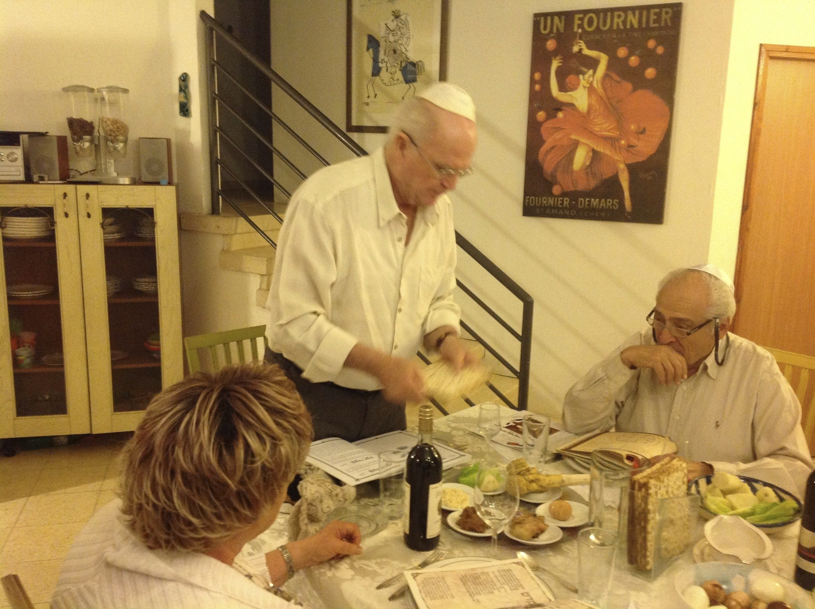 חציית אפיקומן בסעודת ליל-הסדר